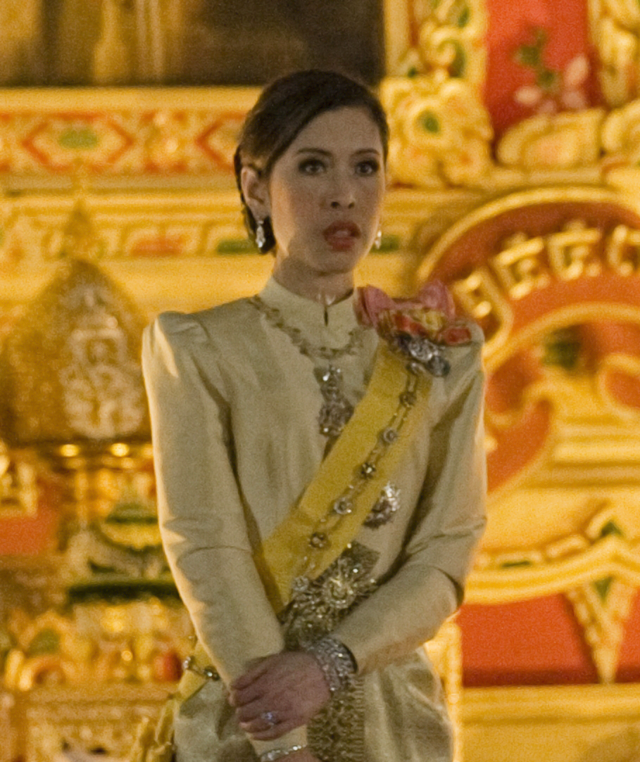 นายกรัฐมนตรี และภริยา เฝ้าฯ รับเสด็จ สมเด็จพระเทพรัตนราชสุดาฯ สยามบรมราชกุมารี เสด็จพระราชดำเนินพร้อมด้วยพระบรมวงศานุวงศ์ในงานสโมสรสันนิบาตเฉลิมพระเกียรติพระบาทสมเด็จพระเจ้าอยู่หัว เนื่องในโอกาสมหามงคลเฉลิม พระเกียรติพระชนมพรรษา วันอังคารที่ 7 ธันวาคม พ.ศ.2553 (Photographer attached to the Prime Minister of the Kingdom of Thailand : Peerapat Wimolrungkarat / พีรพัฒน์ วิมลรังครัตน์) @is50mm